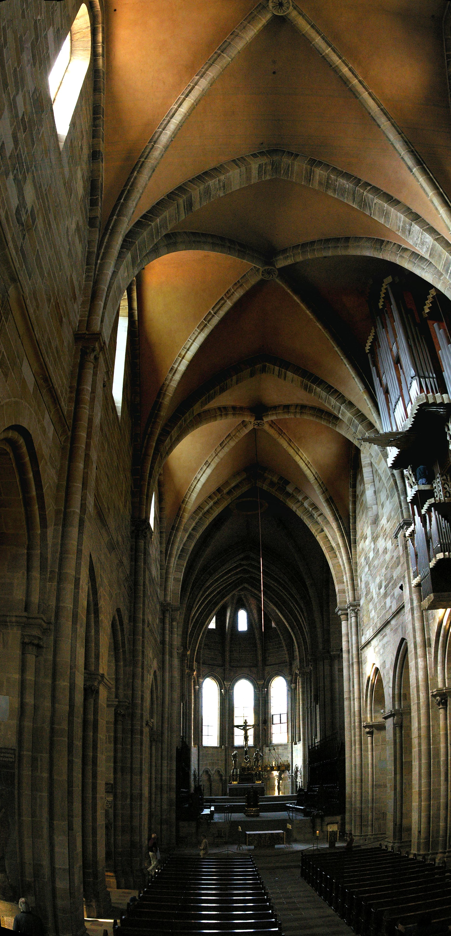 Bamberger Dom - MIttelschiff